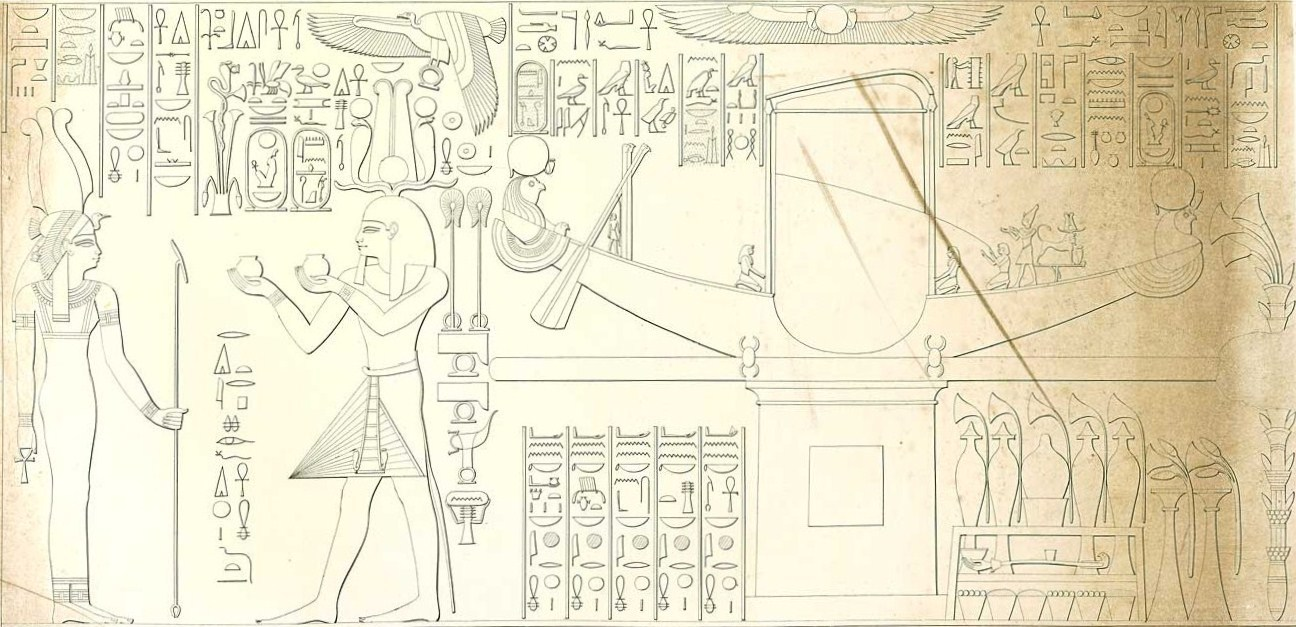 Relief im Tempel des Amenophis III. in el-Kab, Ägypten